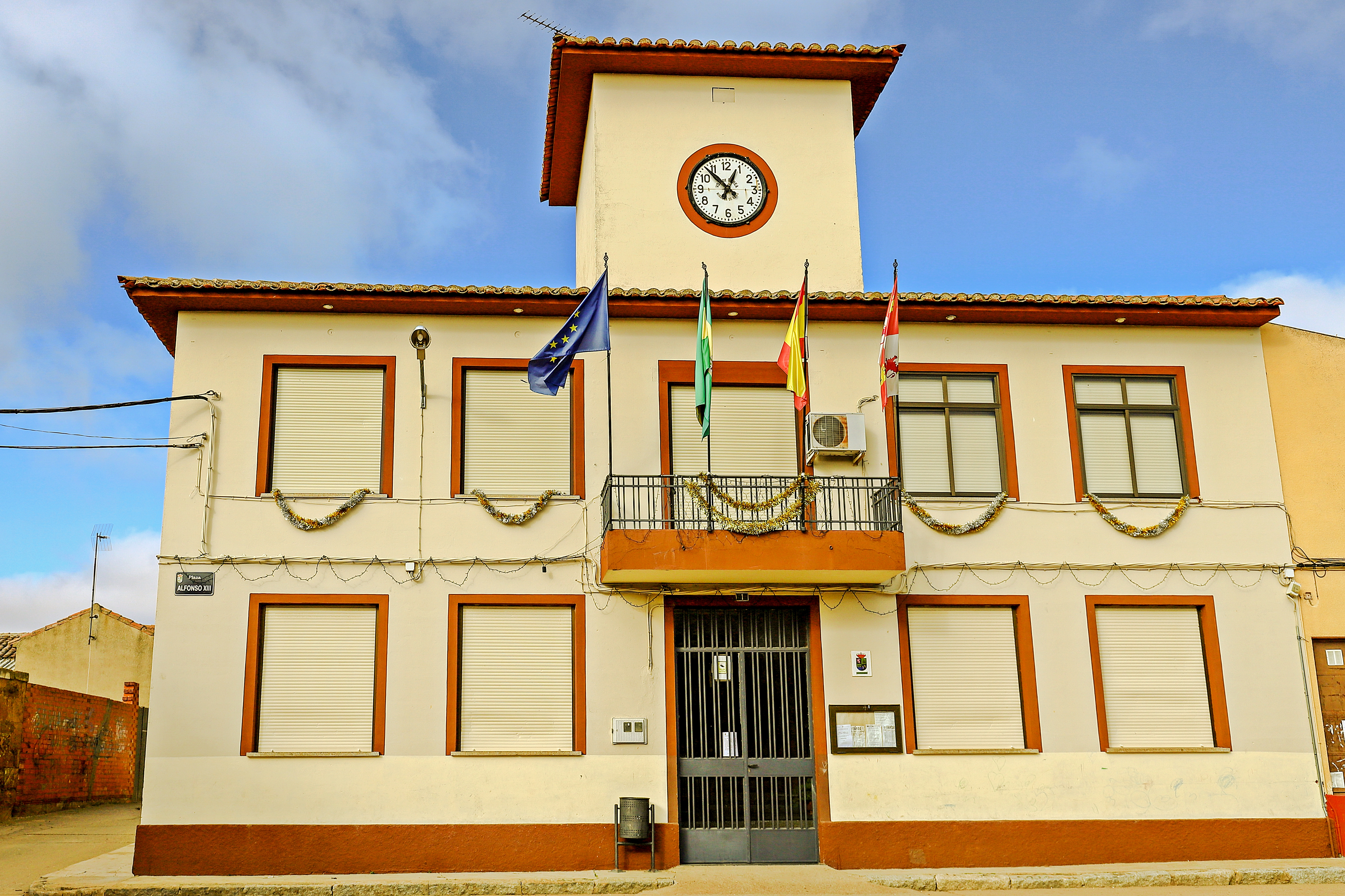 Fuentes de Ropel es un municipio de la comarca Benavente y Los Valles, provincia de Zamora.